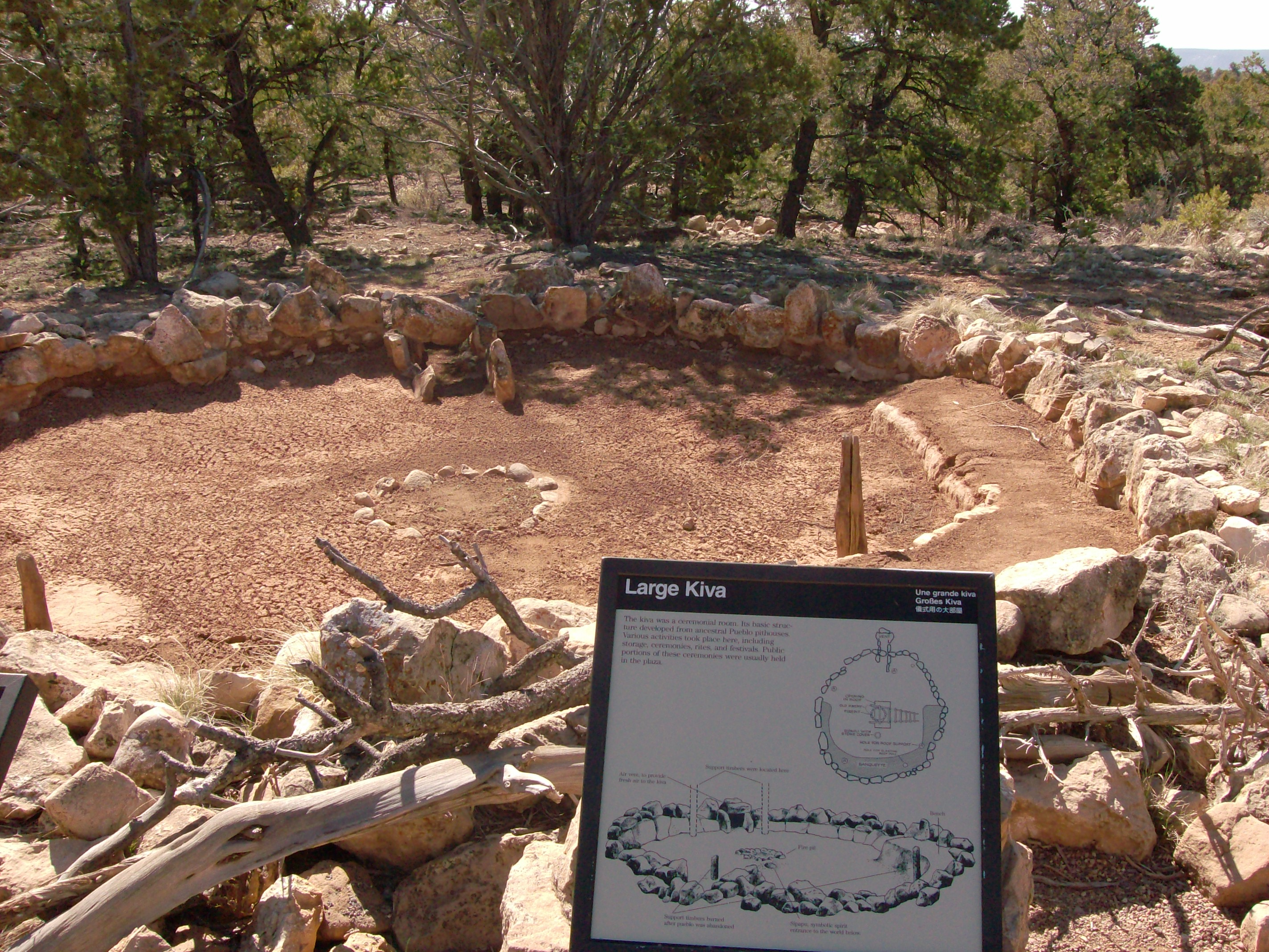 Tusayan Ruins, Grand Canyon National Park